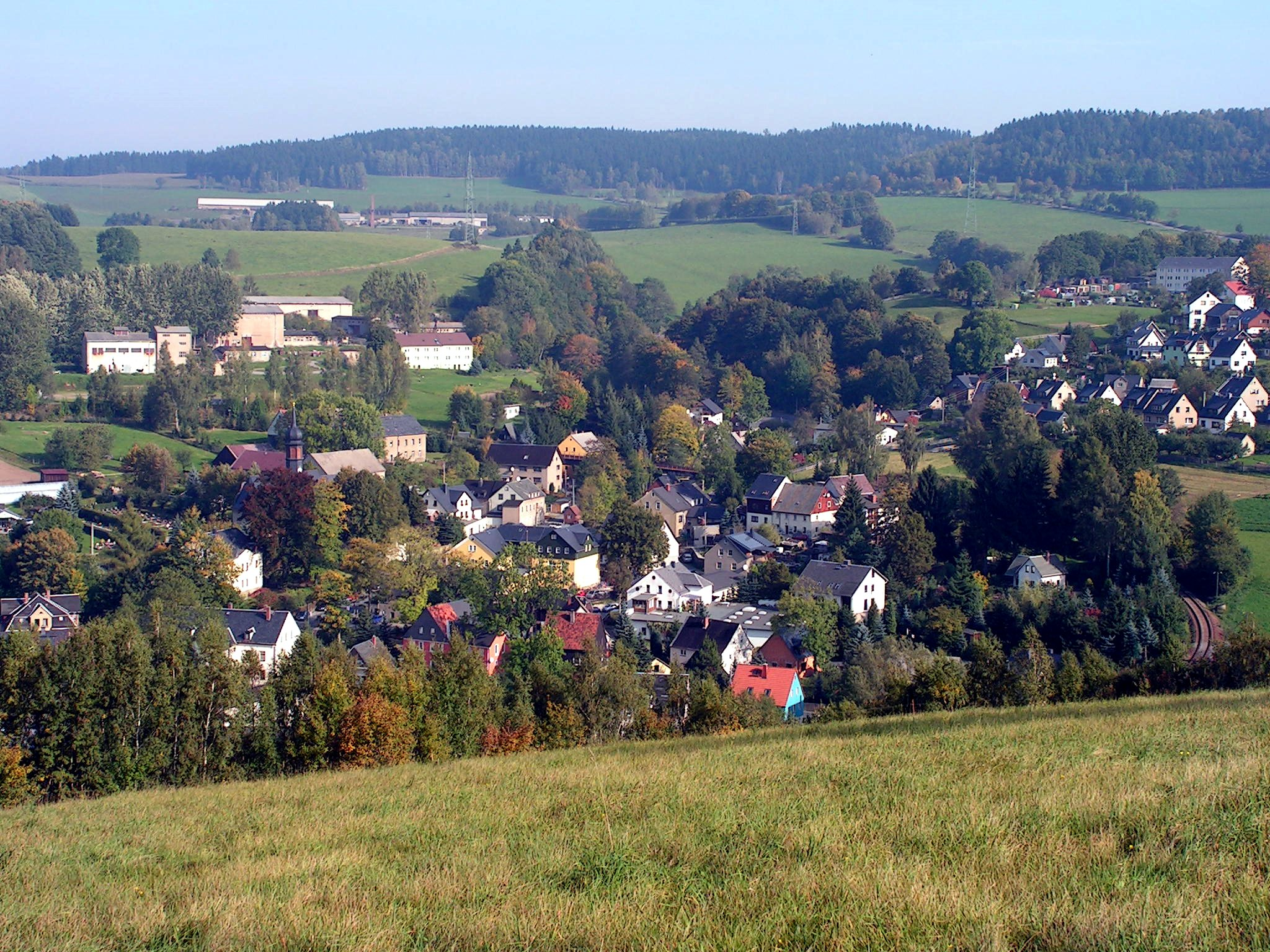 Blick auf Markersbach